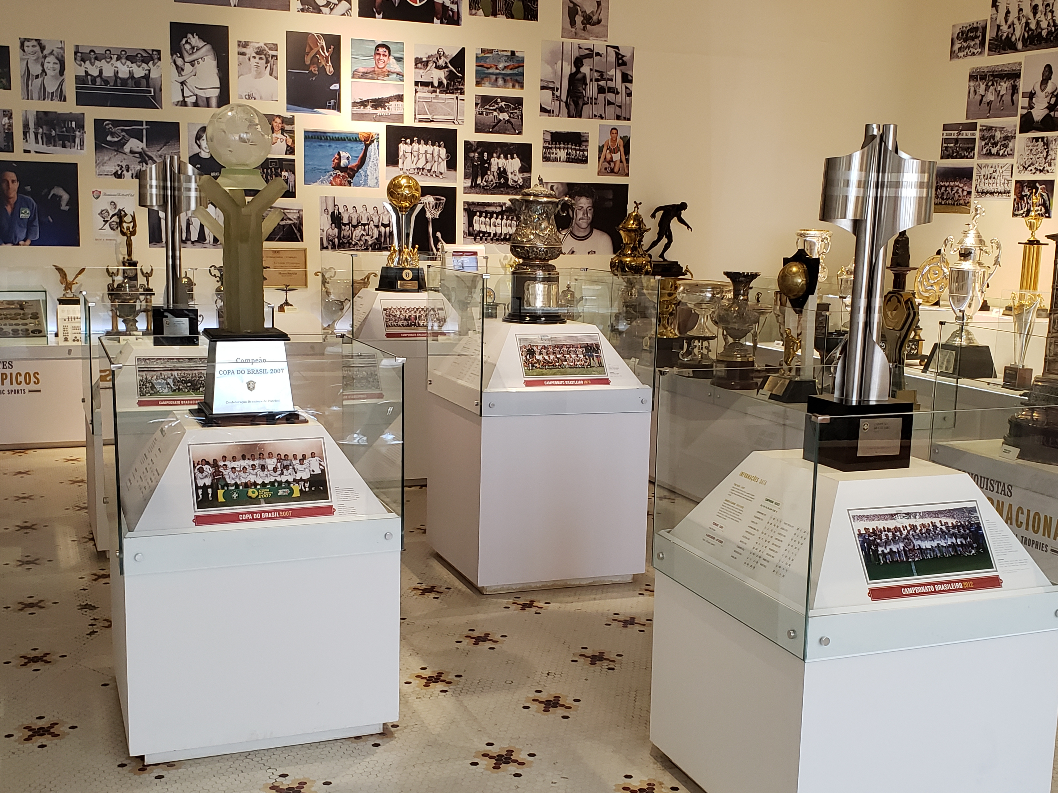 Aspecto parcial da Sala de Troféus do Fluminense Football Club com destaque para as taças nacionais conquistadas pelo clube.